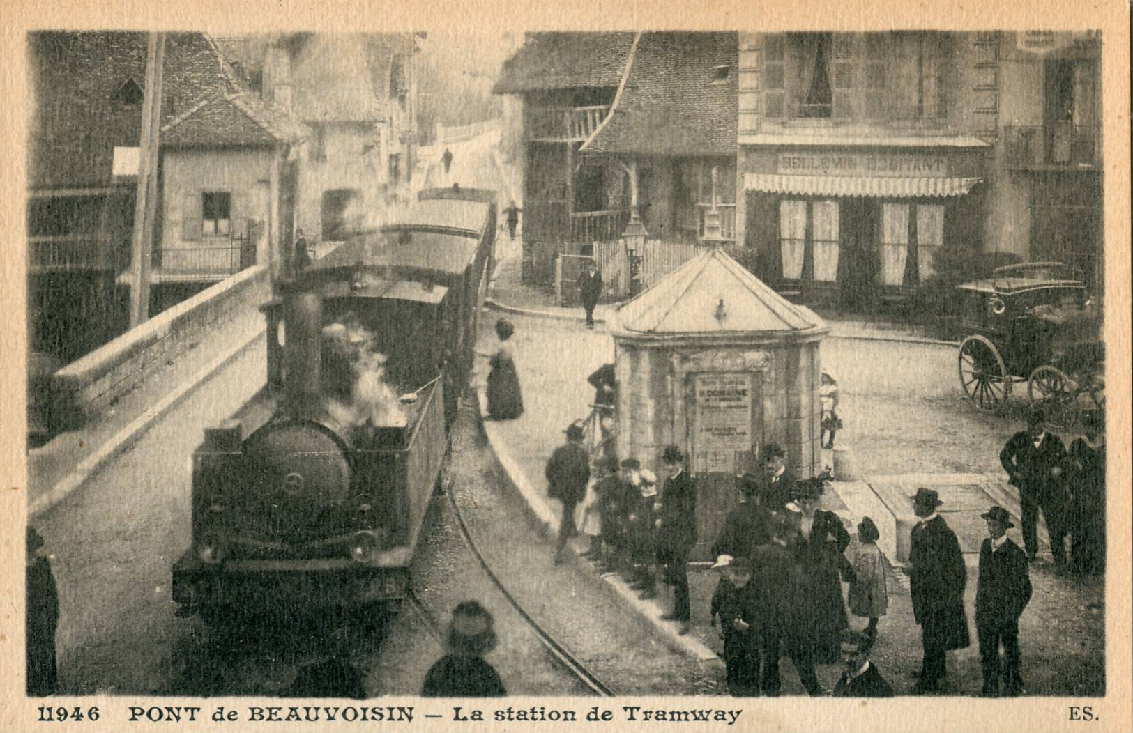 Carte postale ancienne éditée par ES, n°11946Le Pont-de-Beauvoisin (Savoie) - La station de TramwayIl s'agit du Tramway de Pont de Beauvoisin (TPB) à sa station Place Carouge, tracté par une locomotive Pinguely